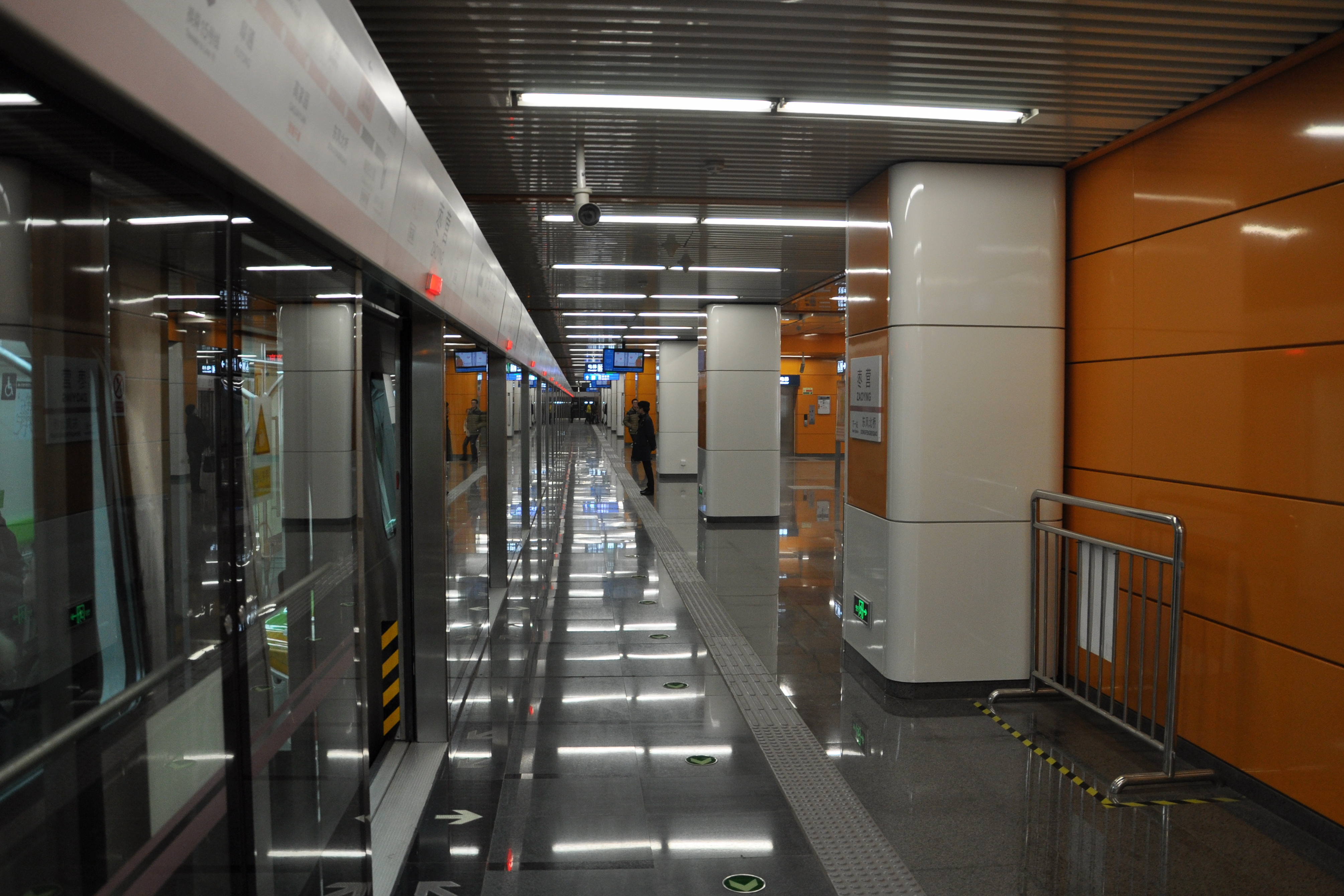 北京地铁14号线枣营站站台